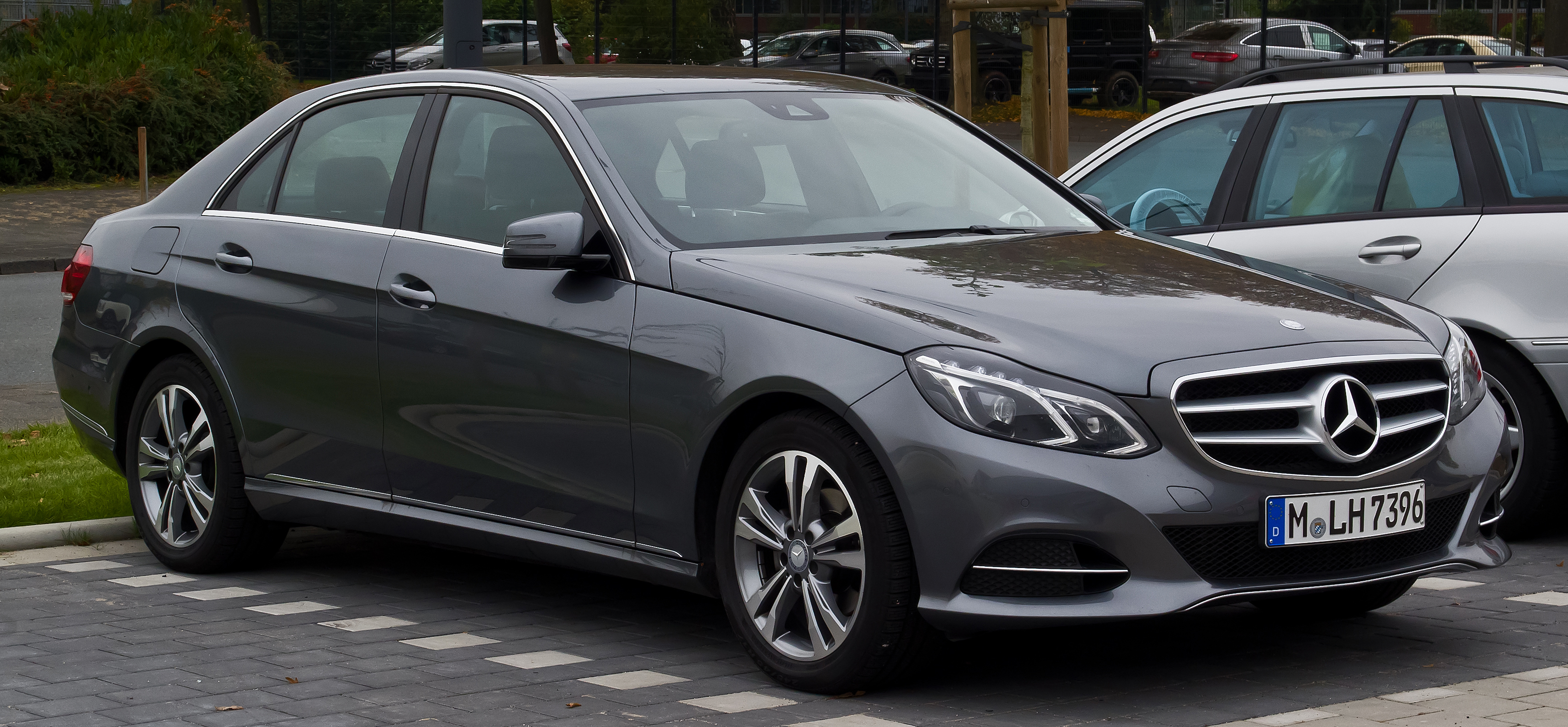 Mercedes-Benz E 200 Avantgarde (W 212, Facelift)